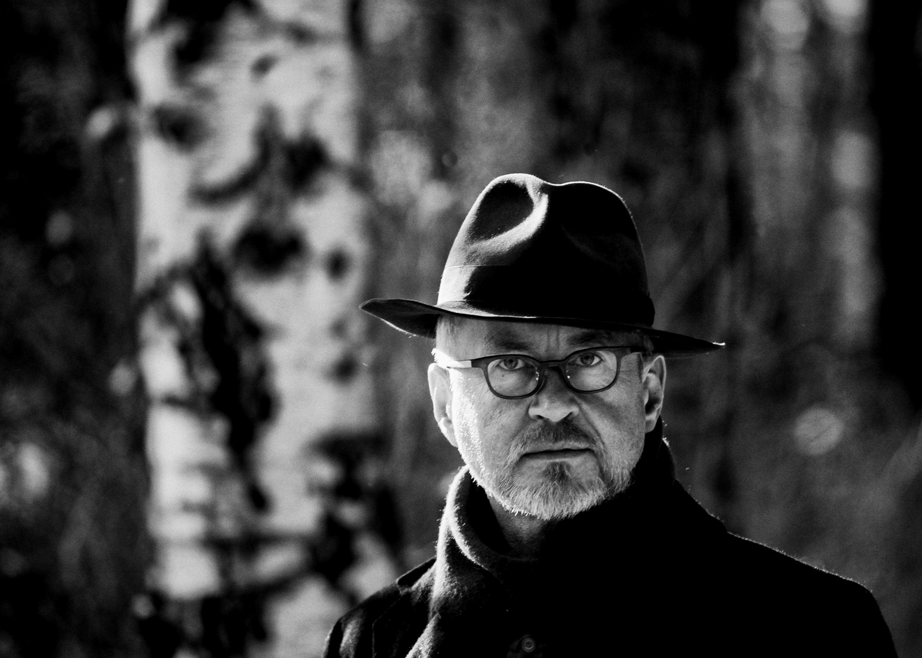 Portrait Bruno Griesel Leipzig, deutscher Maler und Graphiker